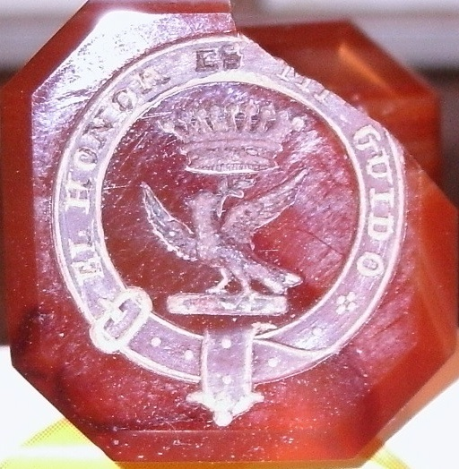 Objeto que perteneció al Duque de Losada y Lousada, tengo también en mi poder una Cruz de Lapis Lazuli con un Cristo de Plata que estaba junto con un collar, era tal vez un rosario